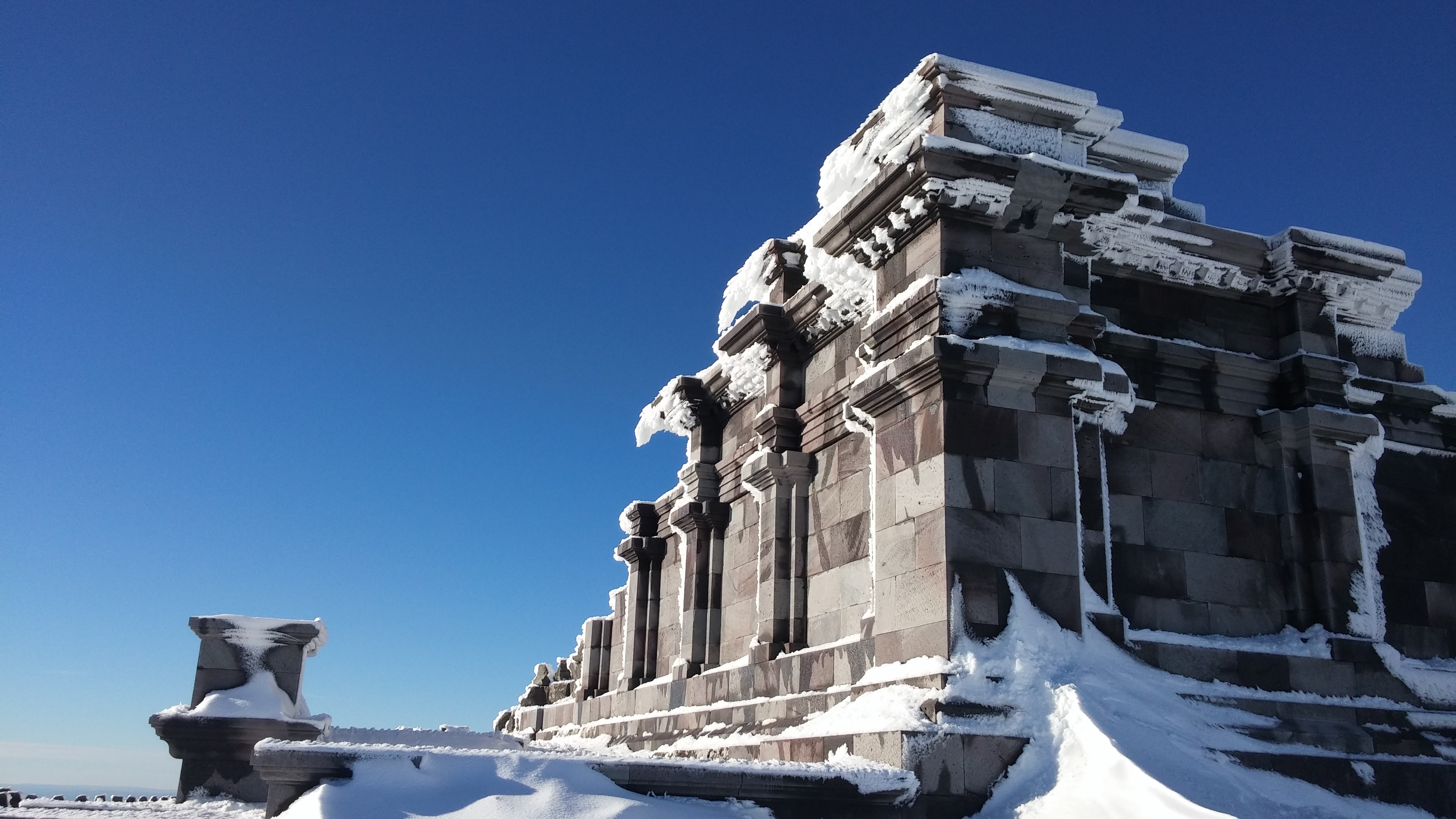 Reconstitution d'une partie du Temple de Mercure, dont les ruines sont visibles au sommet du Puy de Dôme.